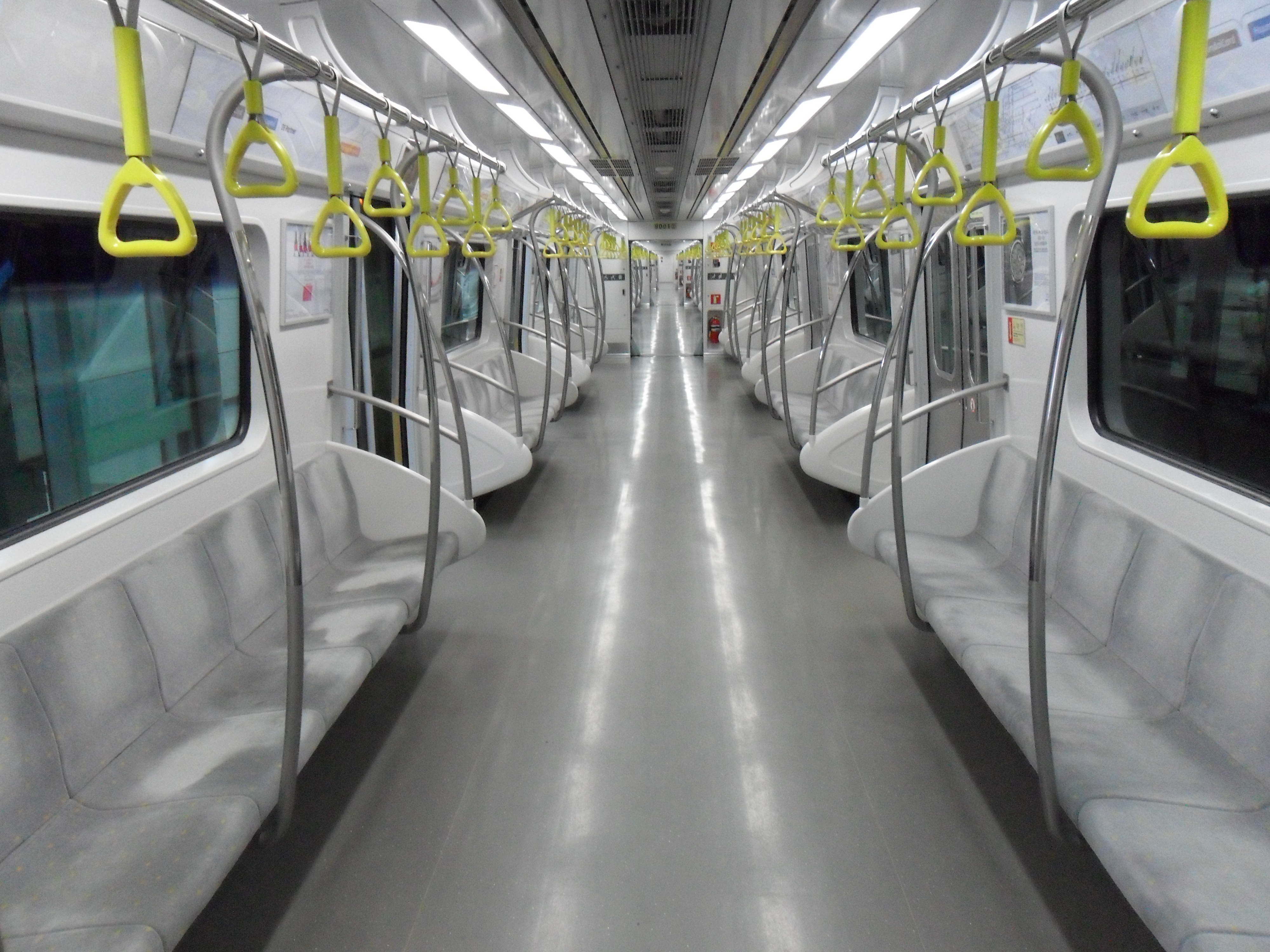 서울시메트로9호선 차량 내부